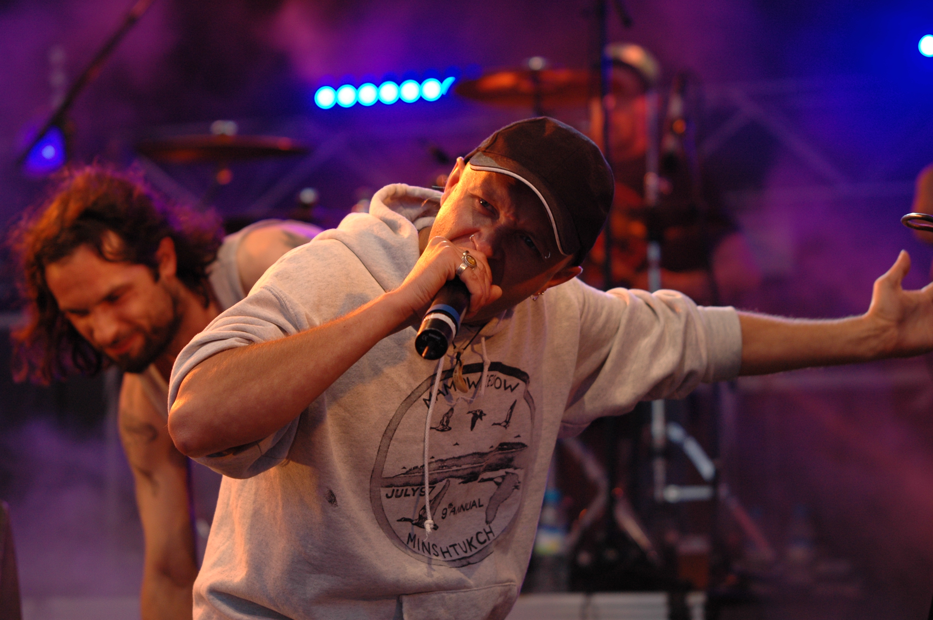 Guizmo et Negoos du groupe Pause sur scène à Bretigny-sur-Orge en juin 2007